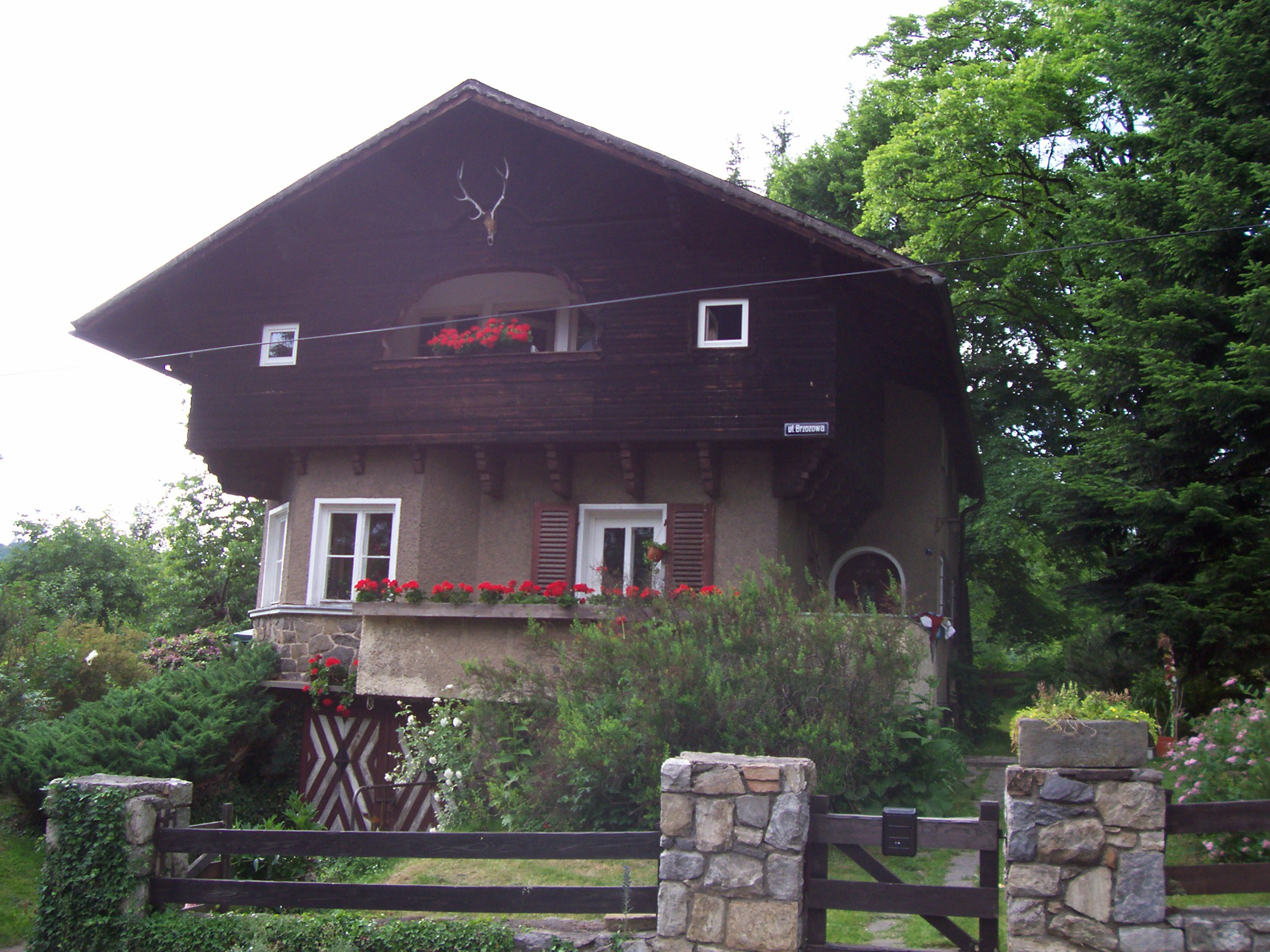 Lądek-Zdrój, ul. Brzozowa - willa "Arka", gdzie w czasach PRL odbył się I Kongres Konfederacji Polski Niepodległej, przerwany przez Służbę Bezpieczeństwa.